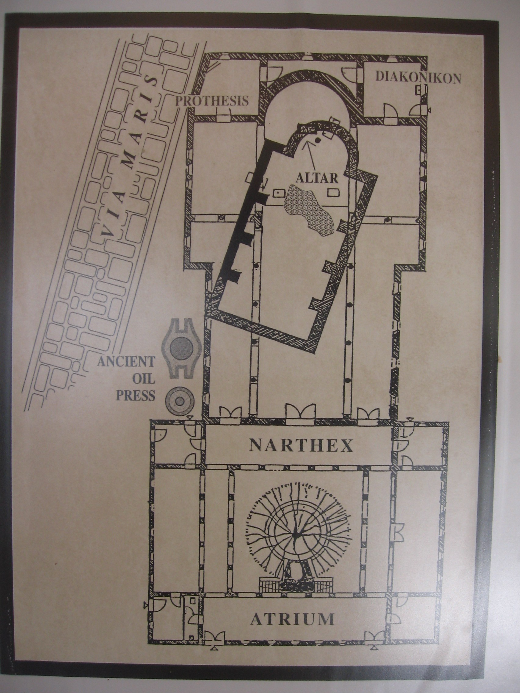 Tabga: chiesa della moltiplicazione dei pani.